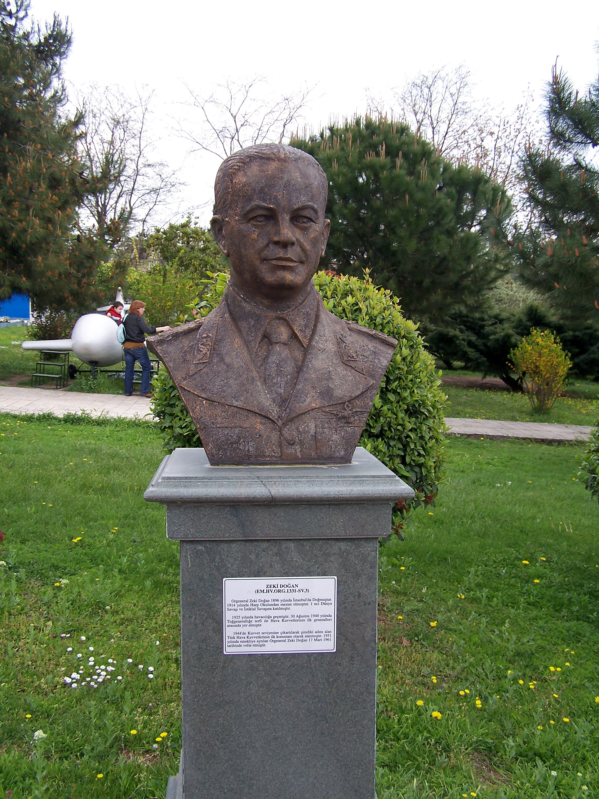 Bust of General Zeki Doğan in Istanbul Aviation Museum (İstanbul Havacılık Müzesi)